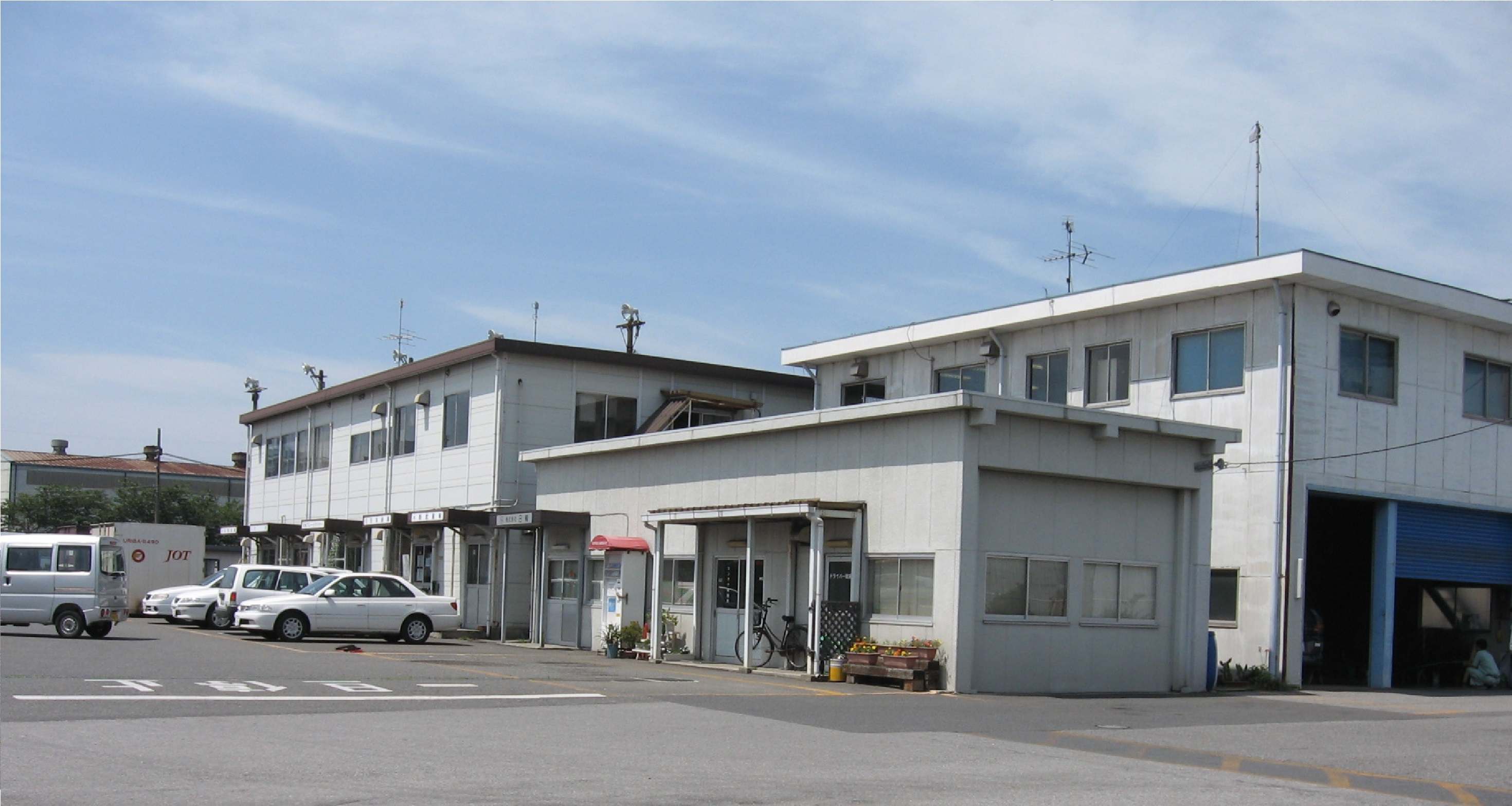 今では貴重品となってきている、旧形式UTI等の貴重なコンテナも取り扱っている。